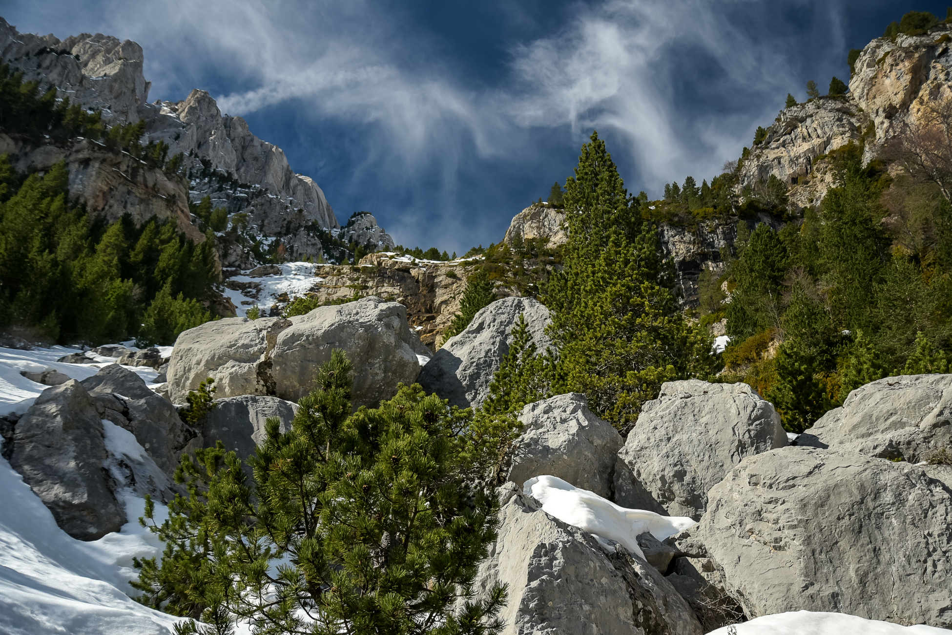 Parc Natural del Cadí-Moixeró